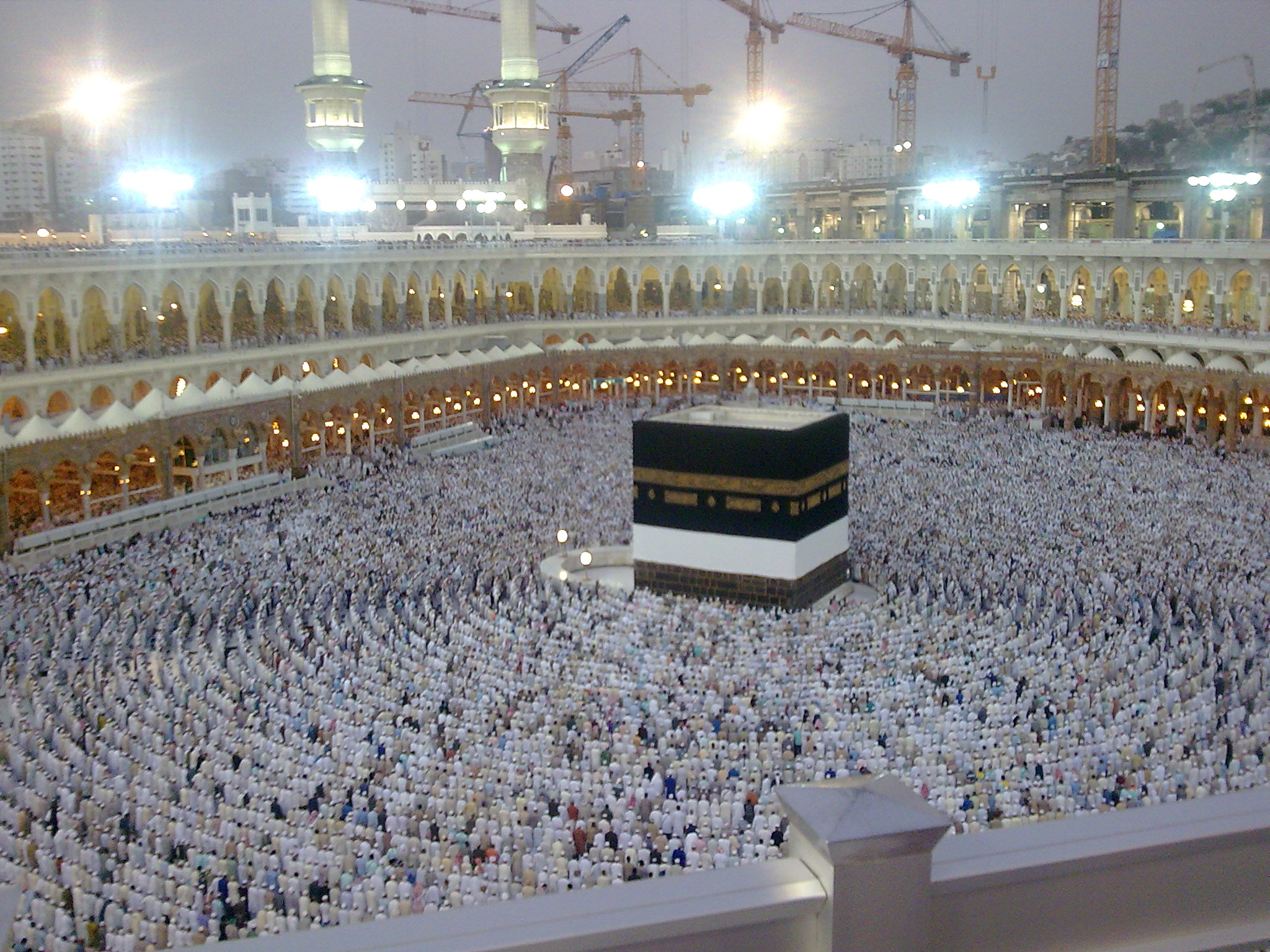 Pray / Salah in Masjid ul Harram